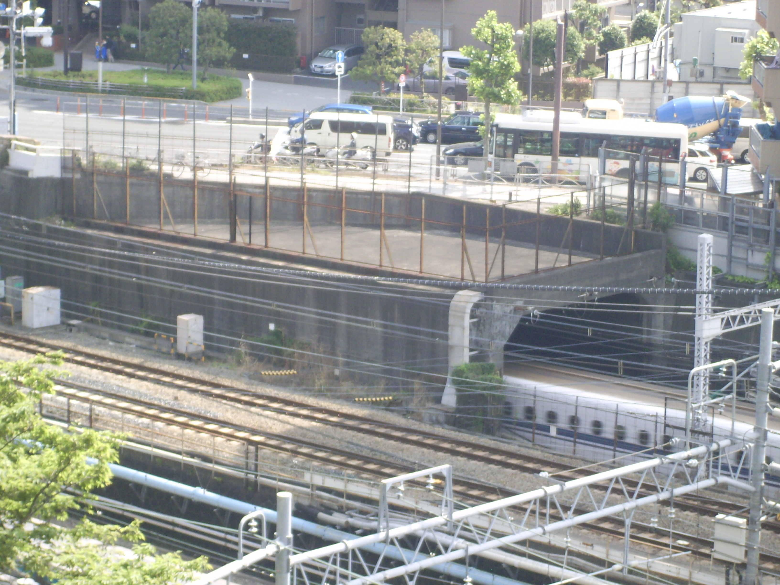 品川区北品川の国道15号（第一京浜）の新八ツ山橋下に位置する東海道新幹線の八ツ山トンネル（延長263m）。地盤をくりぬいたのではなく、地面を全て掘削除去し、函型コンクリート筒（ボックスカルバート）を連結設置したものであることが外壁の露出により分かる。 ㊟カメラを起動すると日付機能が出荷時のものに初期化されるため、ファイル履歴の撮影・投稿日時とメタデータの原画像データの生成日時が異なります